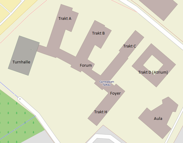 Gebäudeplan des Gymnasium Soltau This map may be incomplete, and may contain errors. Don't rely solely on it for navigation.